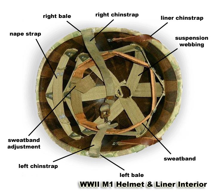 US M1 Helmet & Liner Interior